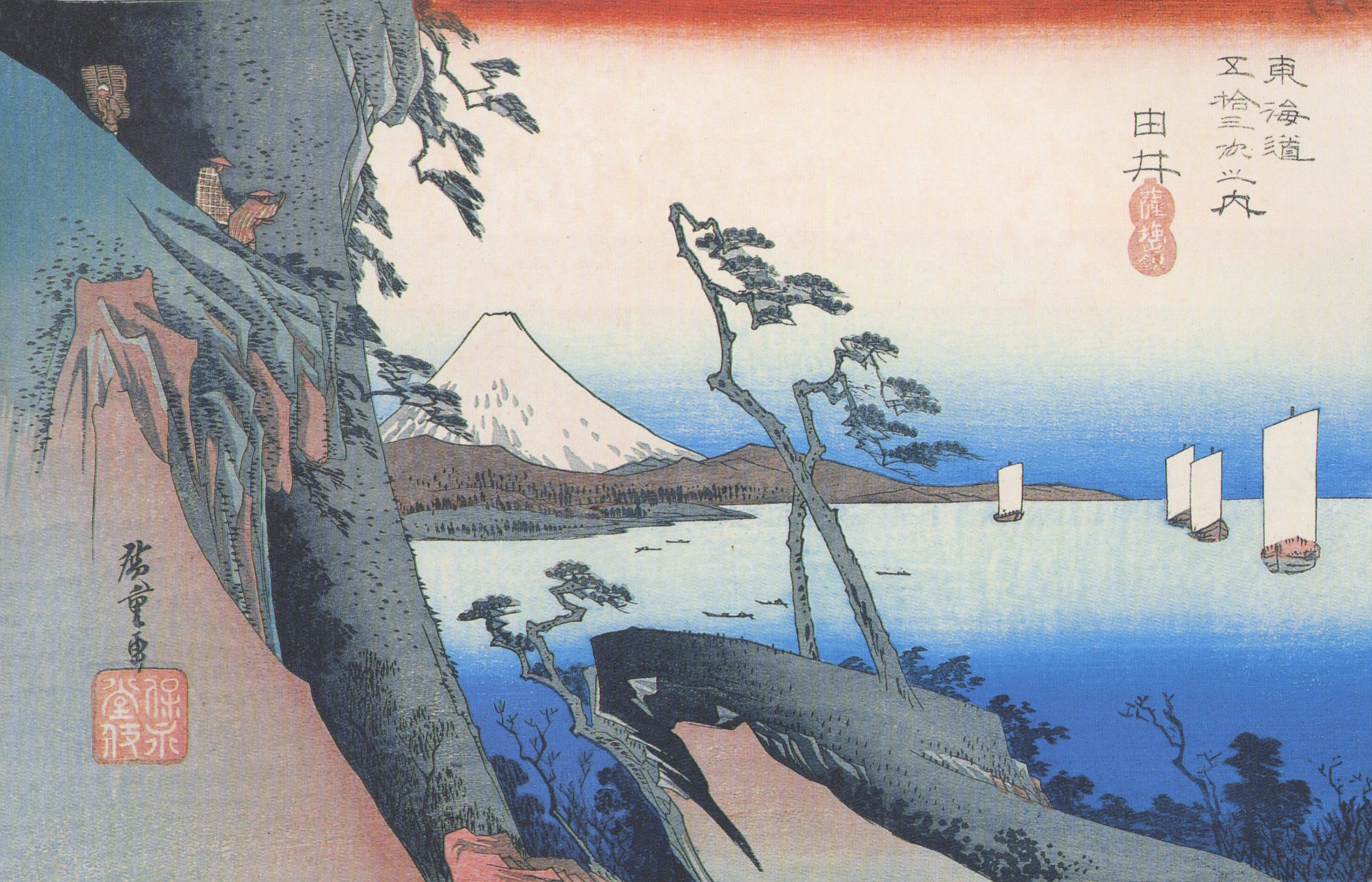 "Tokaido-53tugi Yui",ukiyo-e by Hiroshige.